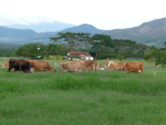 Hacienda La Carolina, Yaracuy, Venezuela, un mes antes de ser expropiada en 2010-04-30.